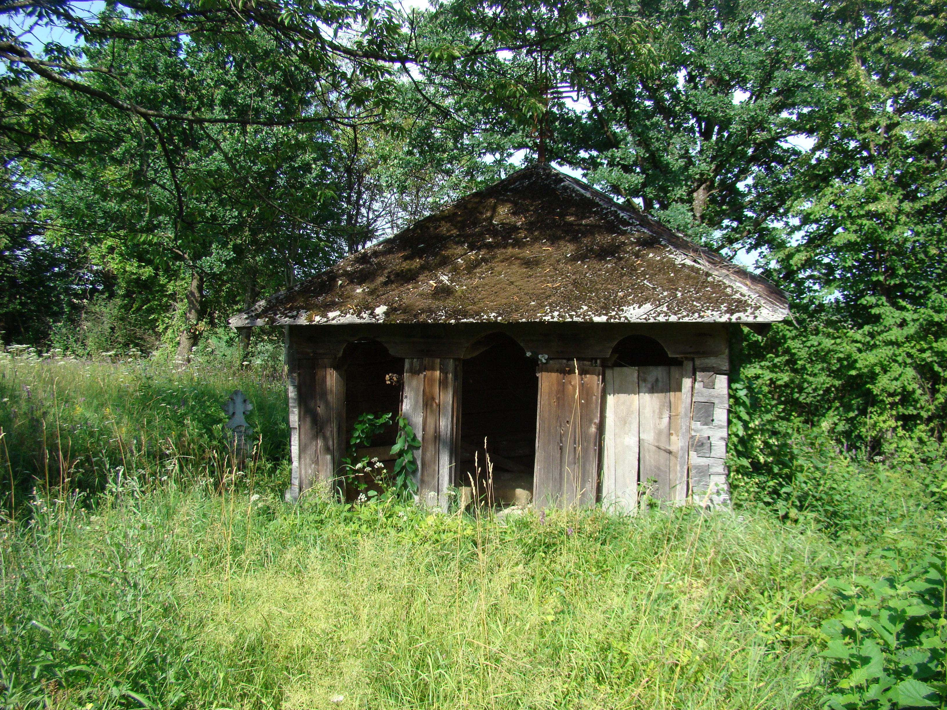 Absida bisericii de lemn "Sf. Arhangheli Mihail şi Gavril" , sat aparţinător CUFOAIA; oraş TÂRGU LĂPUŞ